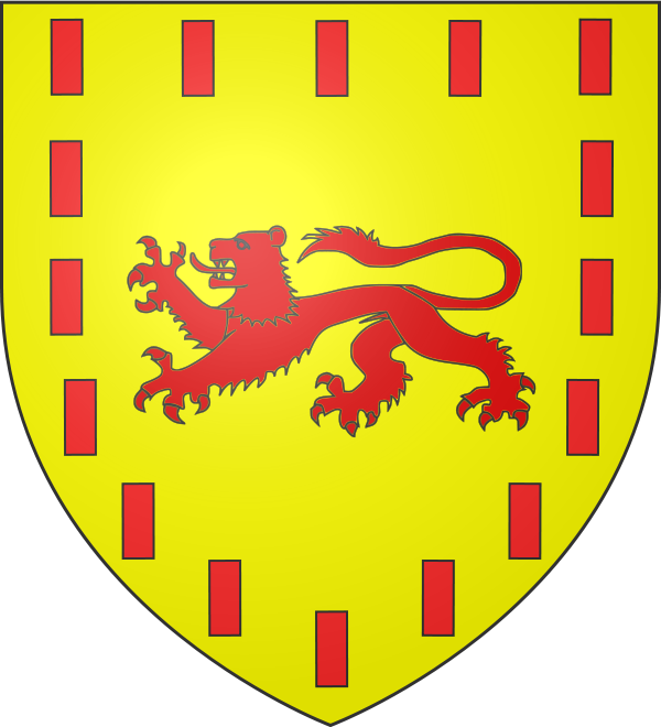 Blason : D'or, au léopard lionné de gueules accompagné de 16 billettes de même posées en orle.